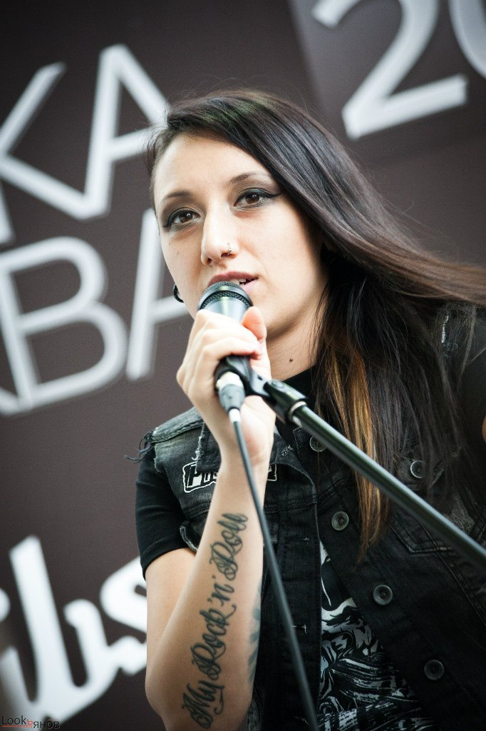 Группа Louna на выставке «Музыка Москва 2012» 21.09.2012г.